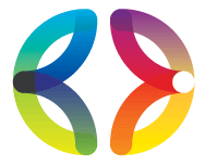 Logo van deNederlandse Hersenbank